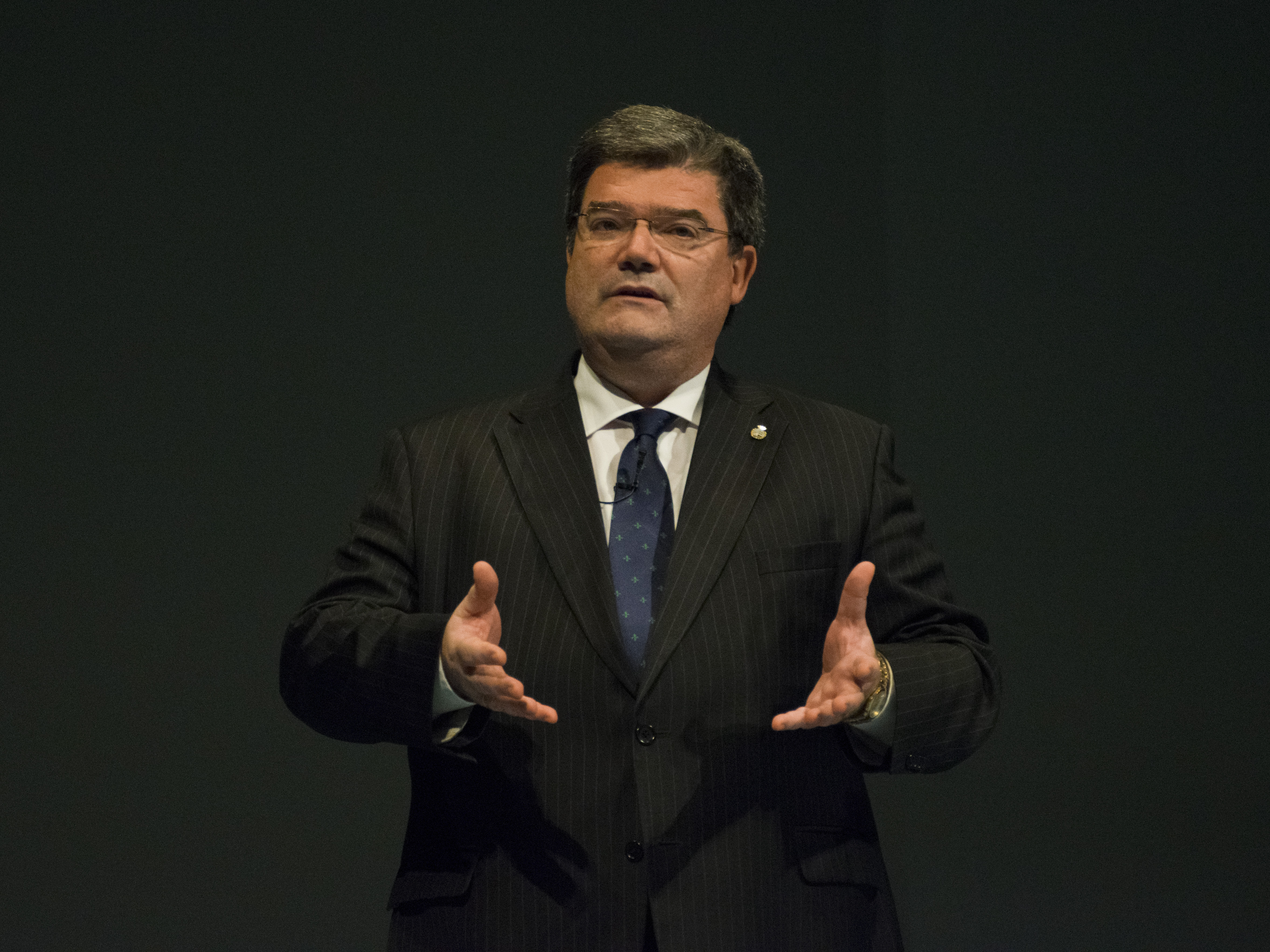 El alcalde de Bilbao, Juan María Aburto, en la Sherpa Keynote 2015